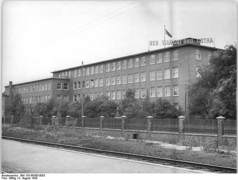 Gotha, Werk des VEB Waggonbau Gotha Zentralbild Wittig 8.8.1959 Vgt-L. VEB Waggonbau Gotha hat gute Perspektiven. Der am 5.8.59 im VEB Waggonbau Gotha an alle Angehörigen des Betriebes ausgegebene Rekonstruktionsplan sieht bis 1965 eine Produktionssteigerung auf 195, 6 Prozent vor. Auf dem Gebiet der schienengebundenen Nahverkehrsmittel wird VEB Waggonbau Gotha künftig der einzige Fertigungsbetrieb in der DDR sein. UBz: Blick auf das Werk.